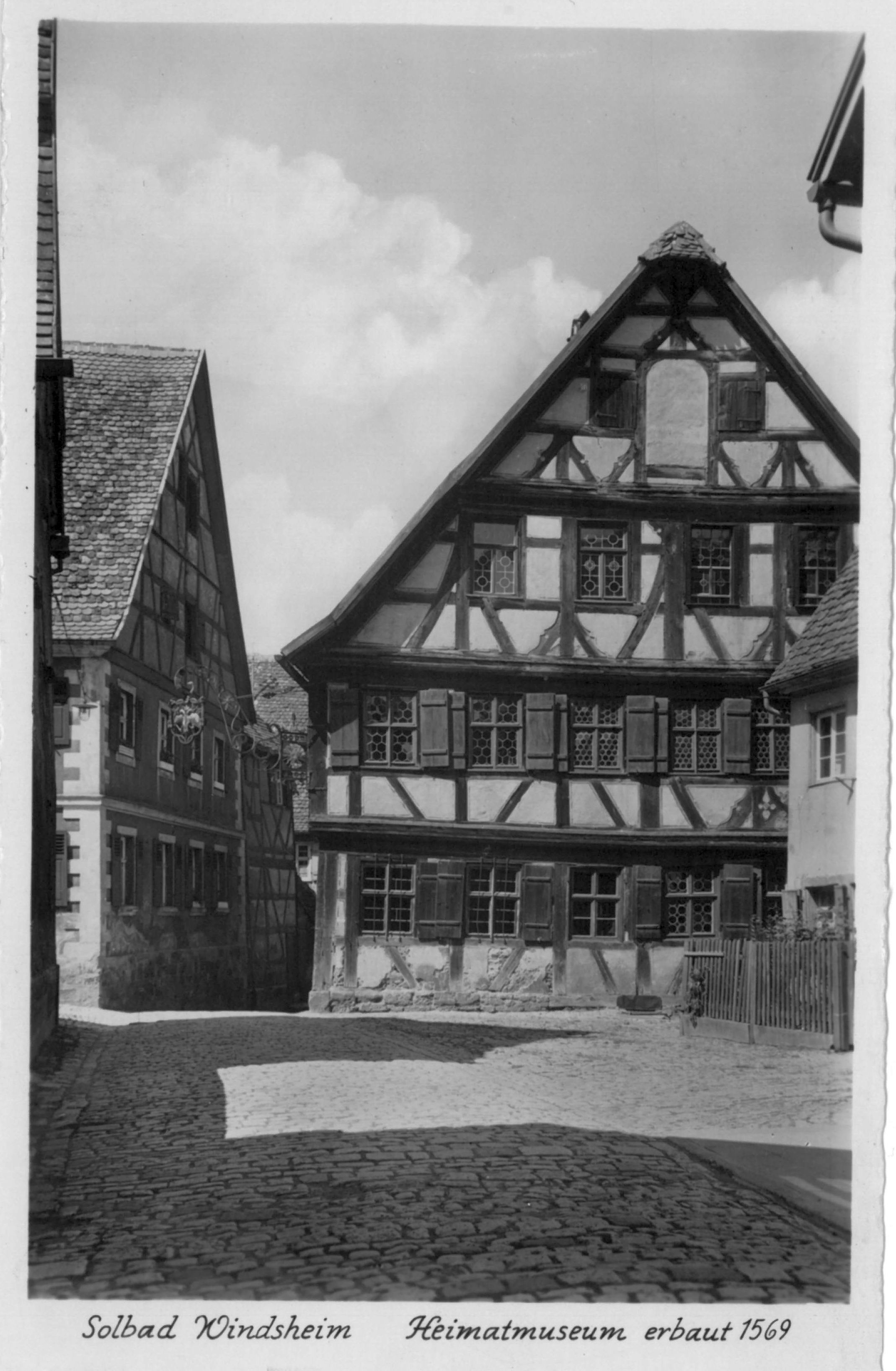 Deutsche Schule aus Hochbrandgips in Bad Windsheim/ Mittelfranken, Schumberggasse